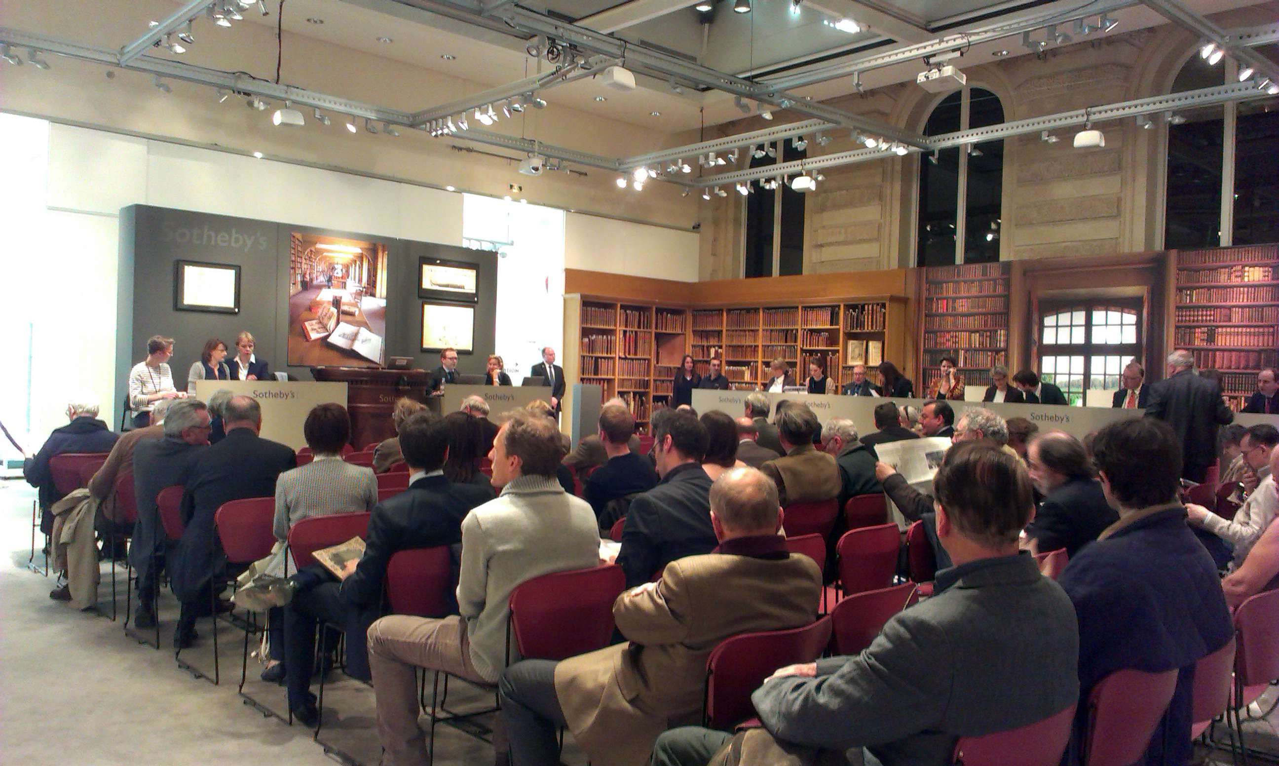 1re vacation de la vente de la bibliothèque du château de Dampierre, appartenant aux ducs de Luynes